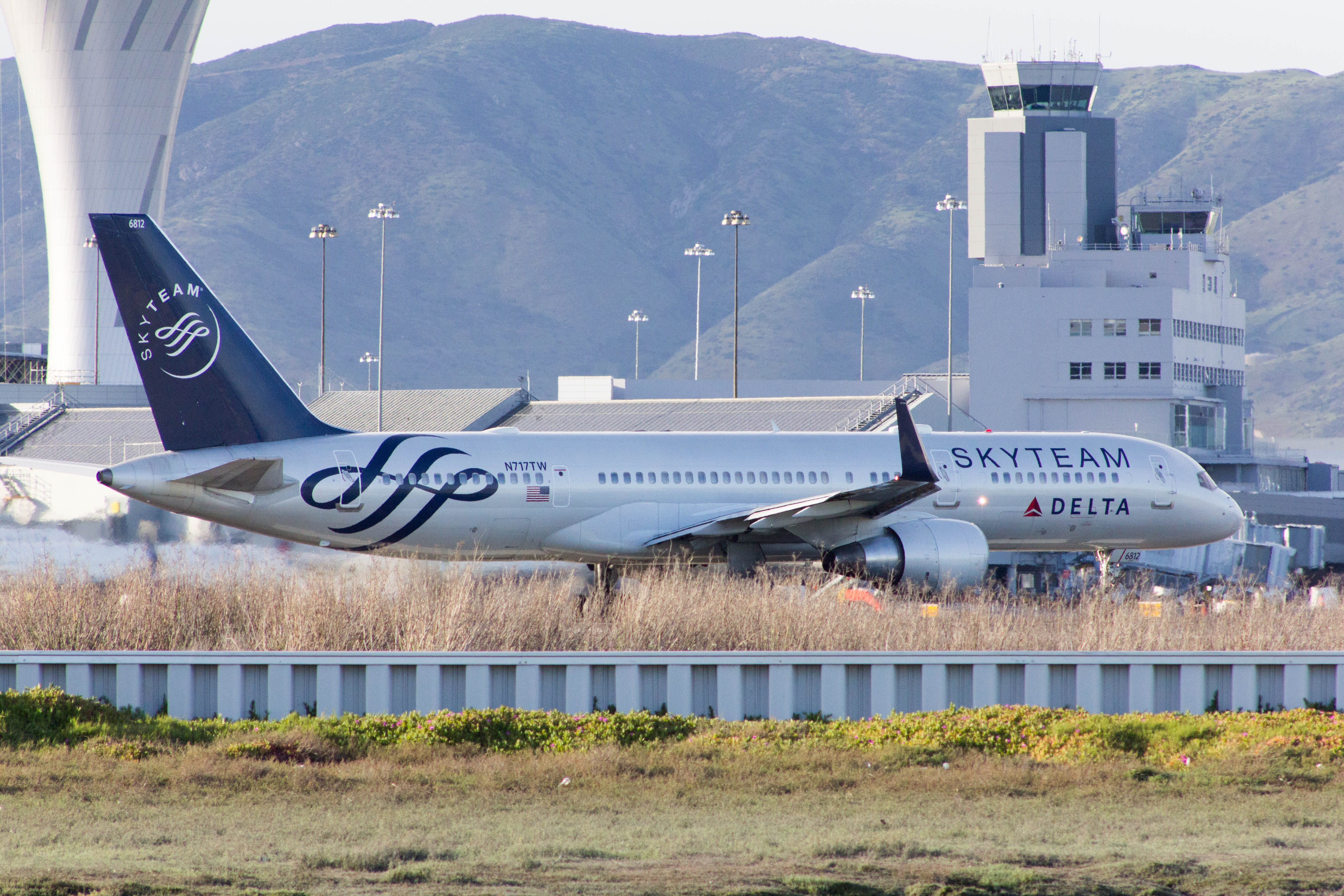 Delta Air Lines Boeing 757-231 N717TW SKYTEAM Livery